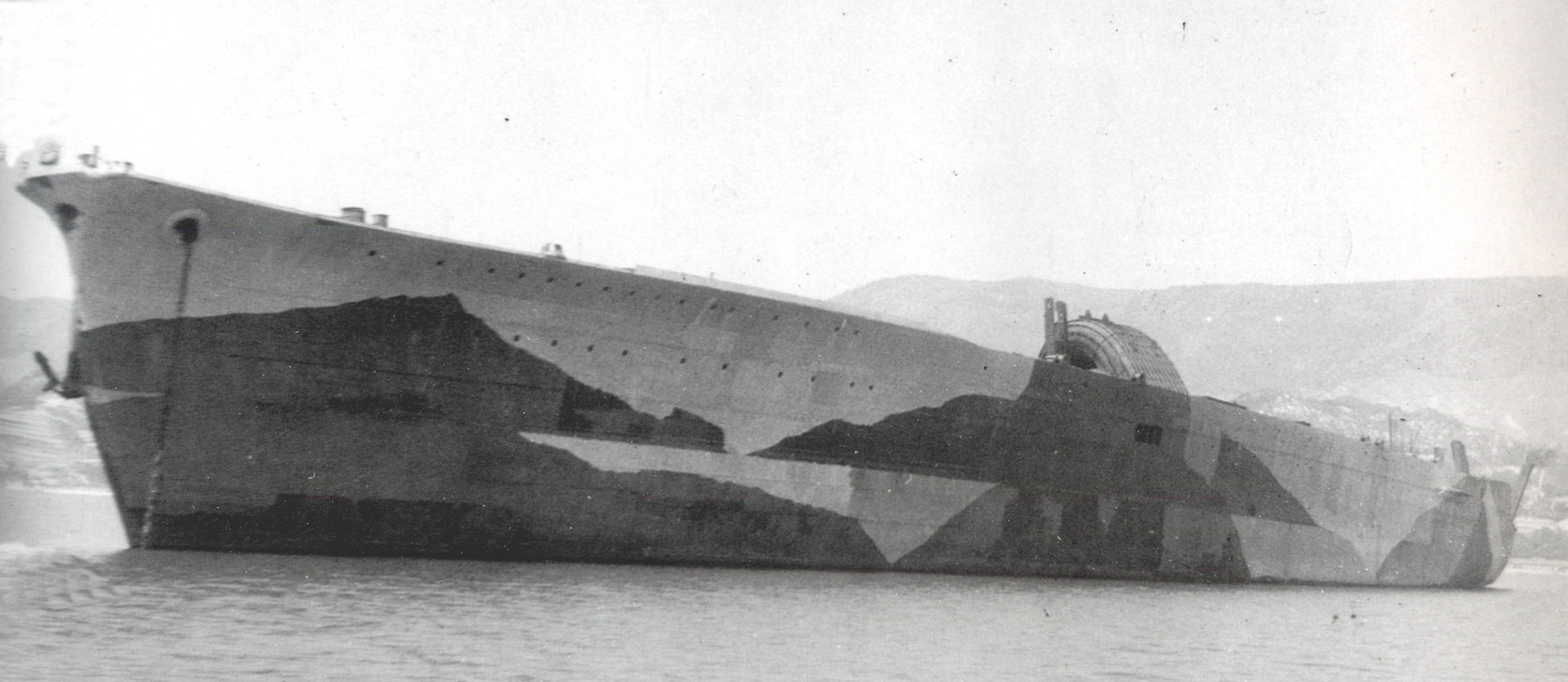 日本海軍航空母艦雲龍型「生駒」小豆島付近で撮影されたもの。